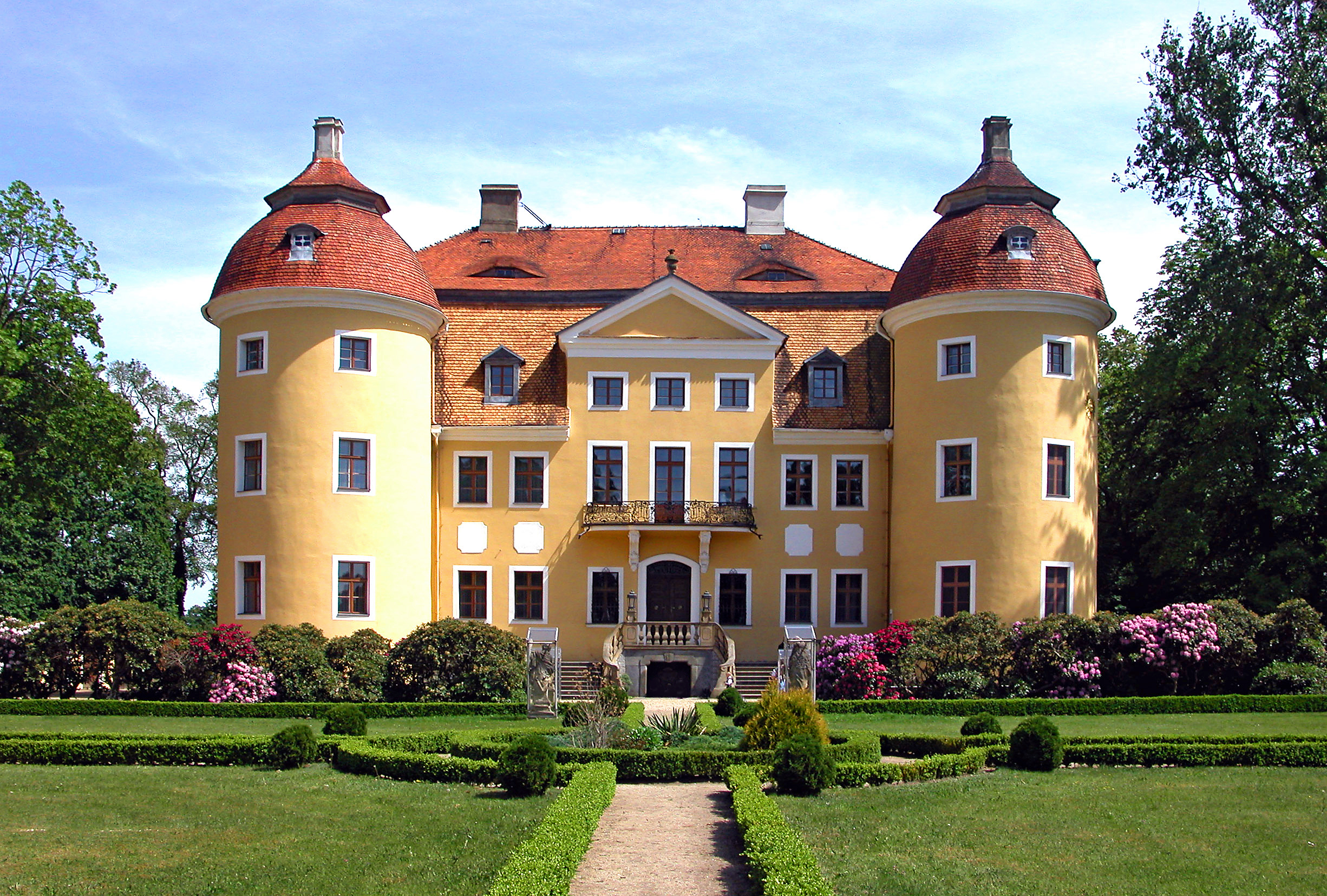 24.05.2003 02627 Milkel (Radibor), Schloßstraße: Schloß Milkel (GMP: 51.299778,14.460743). Erbaut im 13. und 14. Jahrhundert durch die Familie Metzradt auf dem Gund einer altdeutschen Wasserburg. Das heutige Aussehen entstand nach dem Umbau von 1719/1720. Letzter Eigentümer vor dem II. Weltkrieg war 1916-1946 Familie von Holnstein. Von 1945-1947 wurde das Schloß von schlesischen Umsiedlern bewohnt. Von 1948 bis 1953 Weiterbildungsstätte der DDR-Gewerkschaft FDGB. 1953-1995 diente Schloß Milkel als sorbische Sprachschule. Seit 1998 im Besitz der Familie Fuchs. Seither aufwendig renoviert. [DSCN]20030524440DR.JPG(c)Blobelt